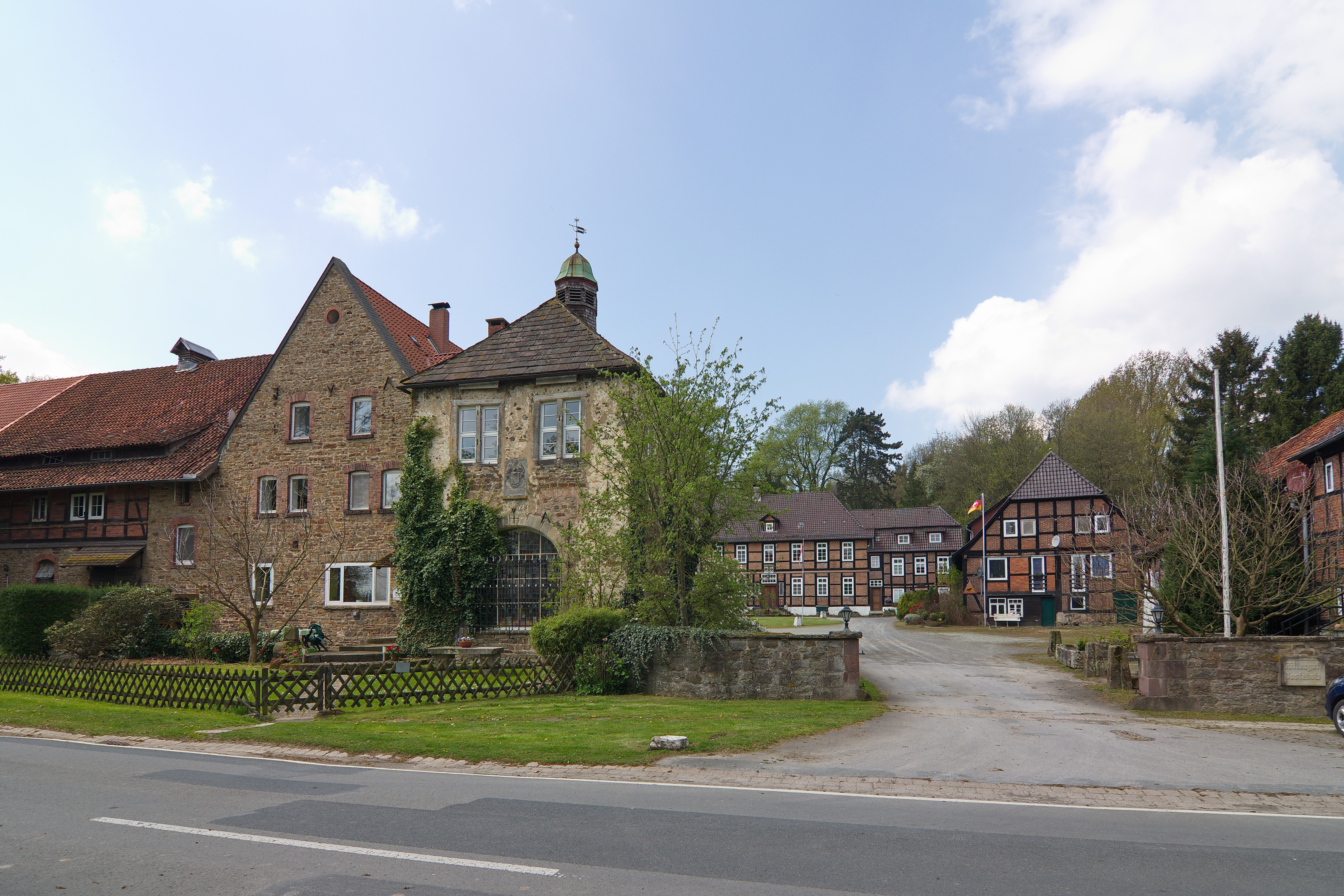 Das Rittergut Posteholz in Posteholz (Aerzen), Niedersachsen, Deutschland wurde im 17. Jahrhundert von dem Geheimen Rat Arnold Ludwig von Post errichtet.